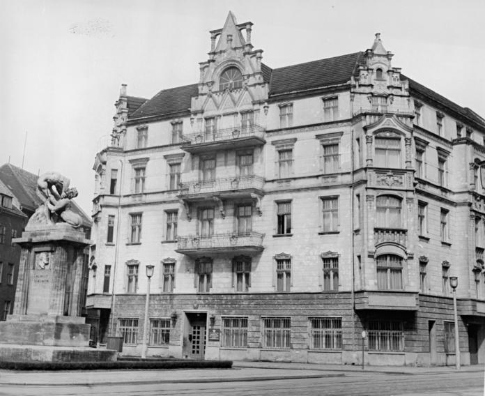 Berlin, Polnische Botschaft, Denkmal Zentralbild Baier 22.4.1958 Berlin, Die Botschaft der Volkrepublik Polen in der Luisenstrasse.